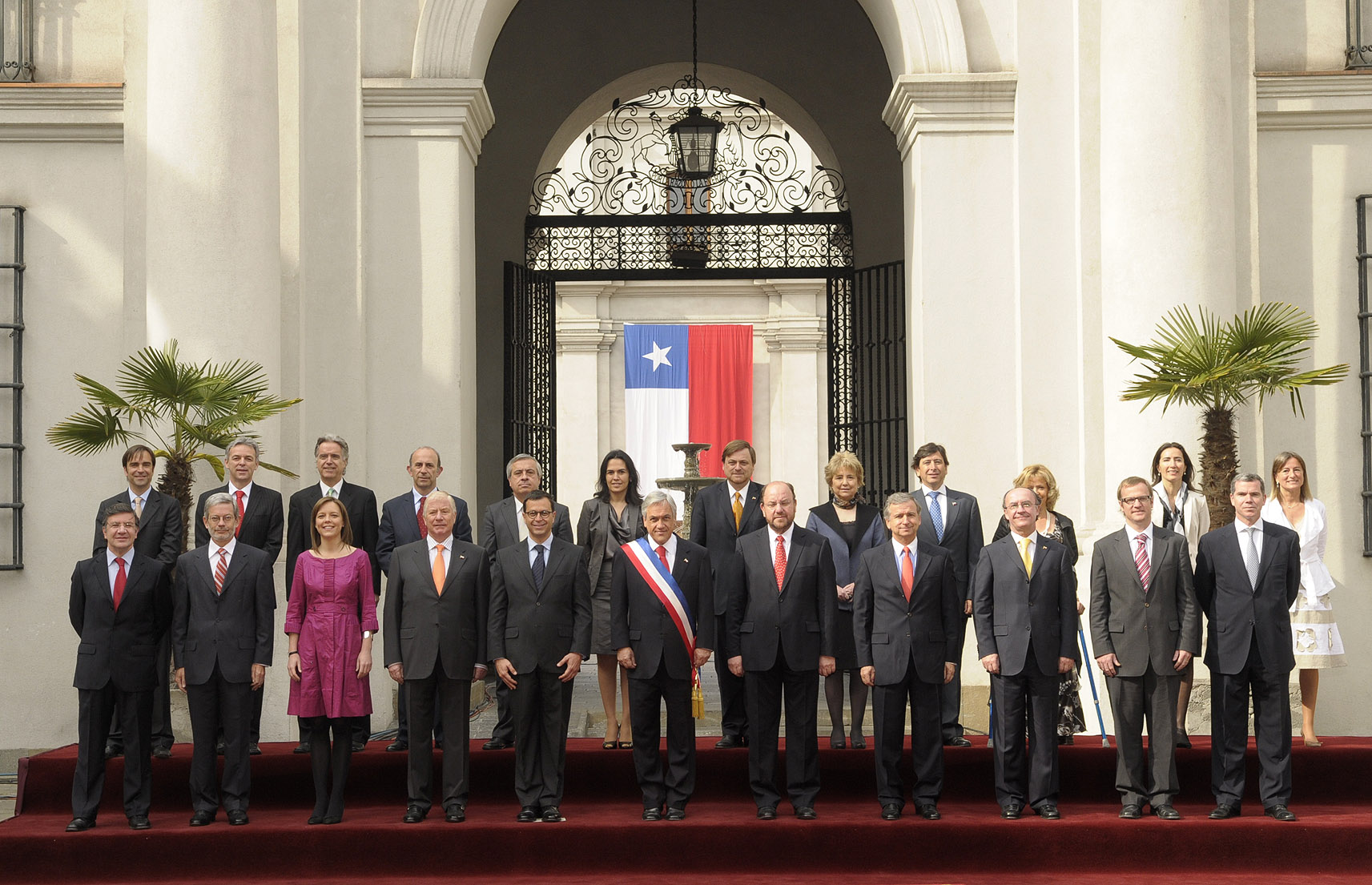 Fotografía Oficial Bicentenario del Gabinete del Presidente Sebastián Piñera.